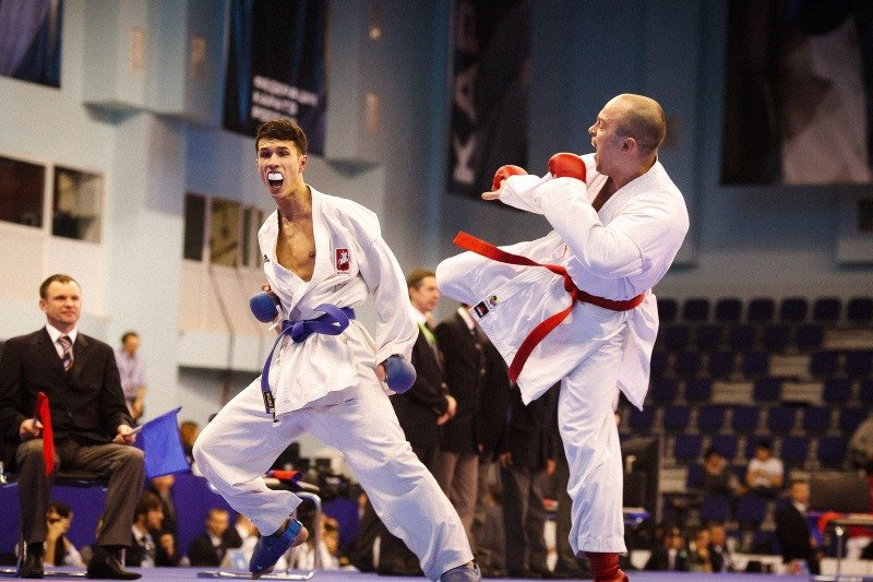 не помню какой 2007 год